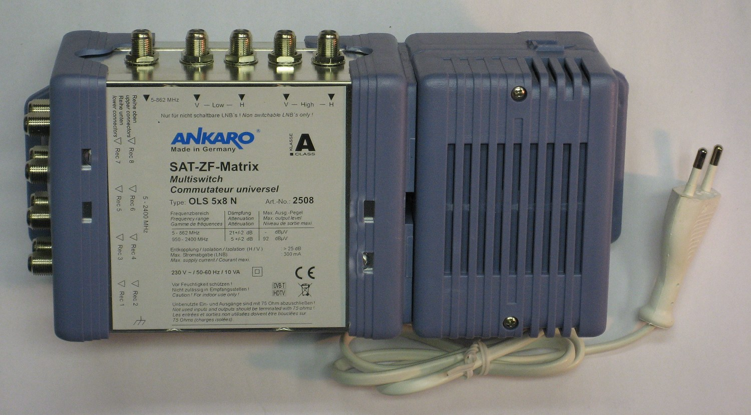 Digitaltauglicher Multischalter mit 8 Ausgängen